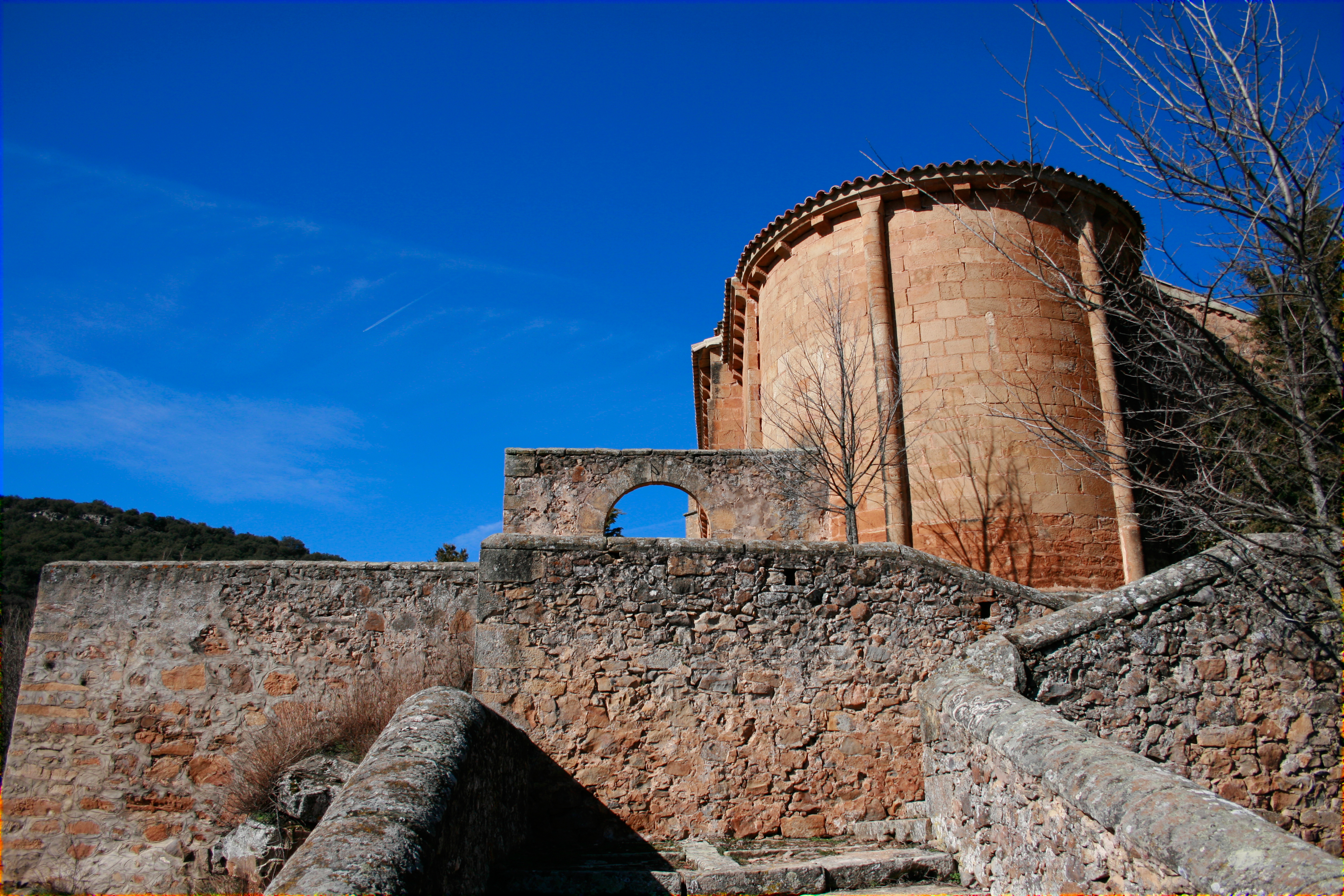 Abside de la parroquia de San lorenzo.